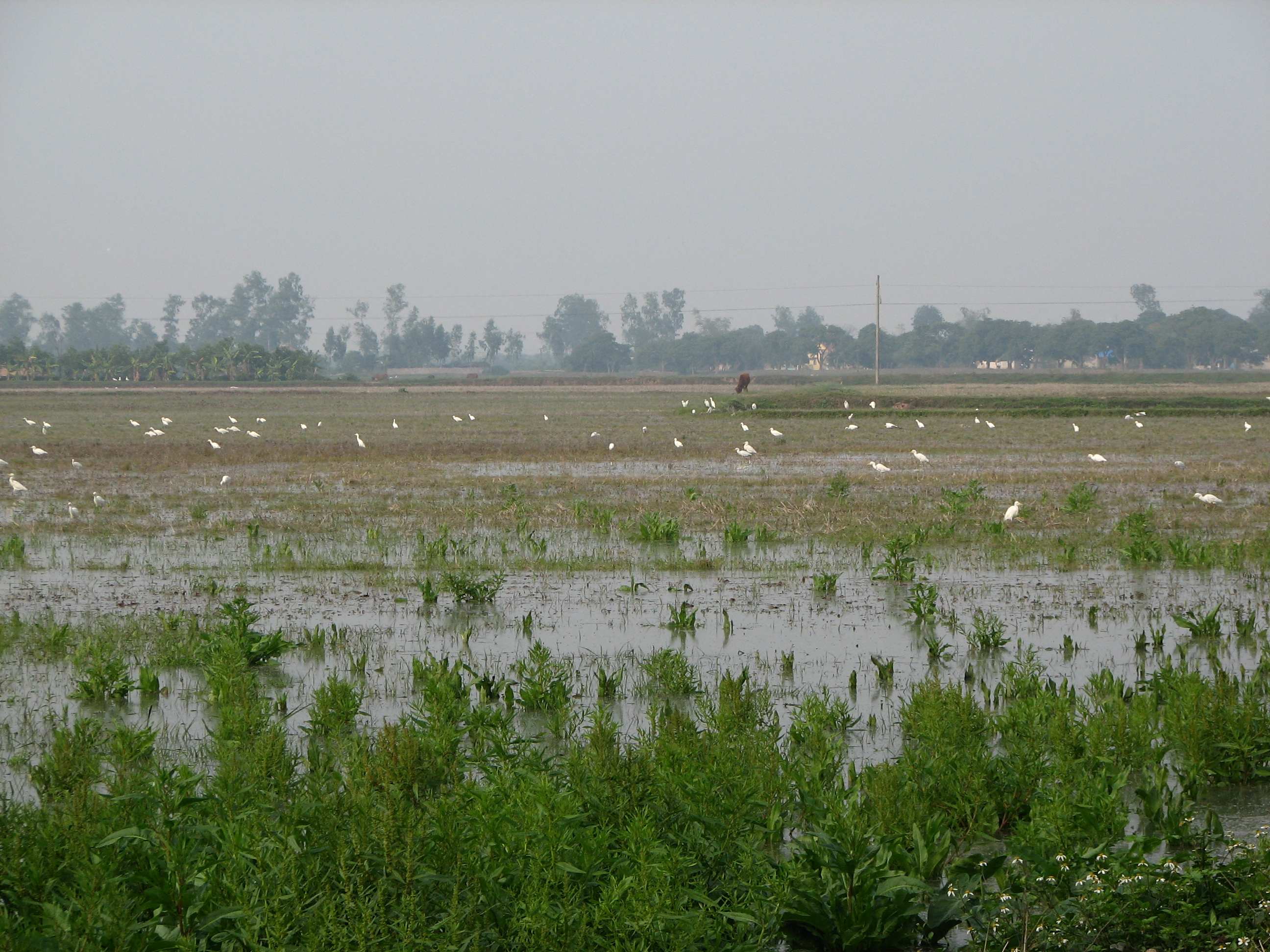 đồng cò Duy Tiên, Hà Nam - tết 2008